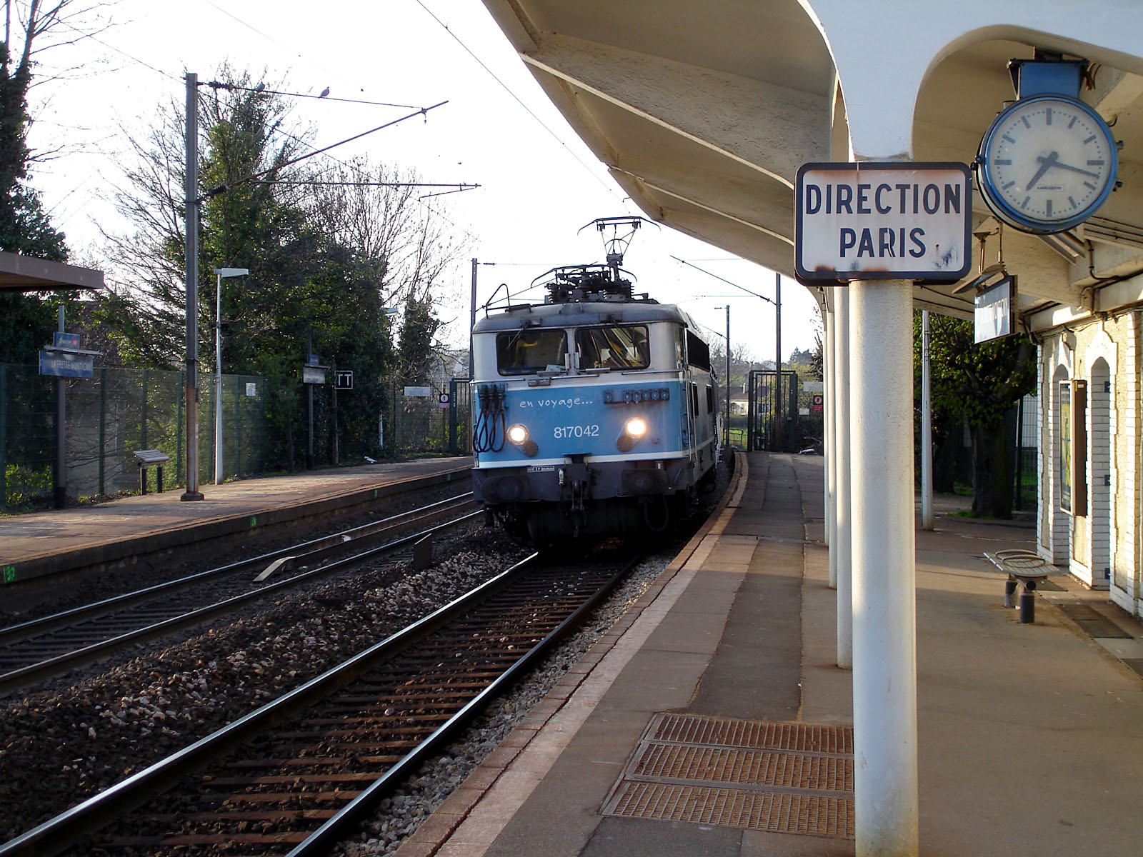 La gare de La Frette - Montigny, à La Frette-sur-Seine, Val-d'Oise, France.